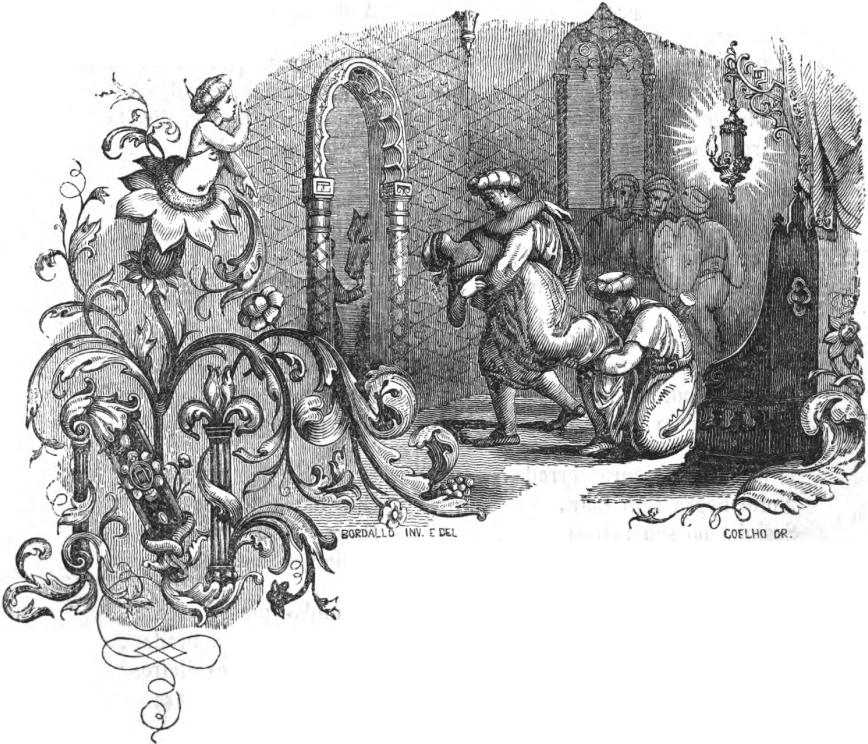 Ilustração da obra poética de Almeida Garrett Miragaia.